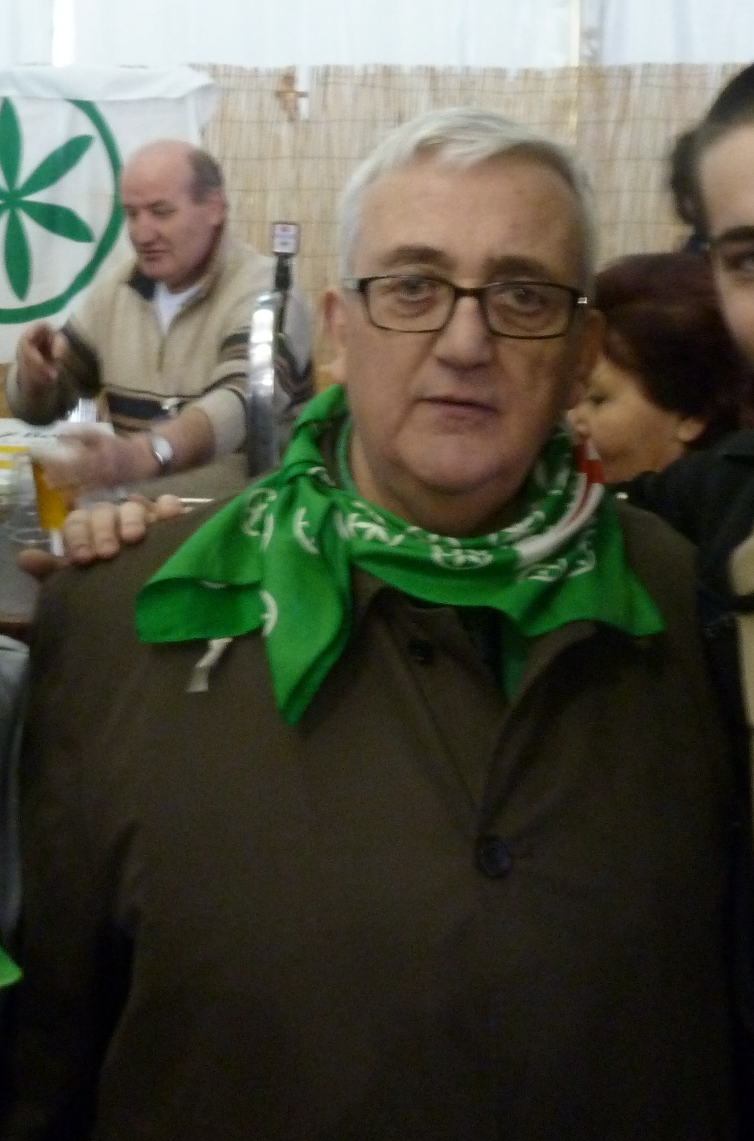 Mario Borghezio durante il raduno di Pontida 2013.